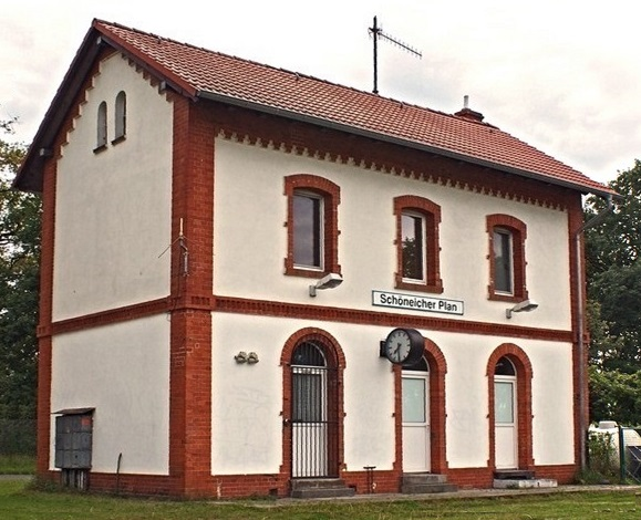 Das Bahnhofsgebäude Schöneicher Plan (Telzer Plan 1A, 15749 Mittenwalde) wurde 1903 von der Berliner Baufirma Vering & Waechter für die Neukölln-Mittenwalder Eisenbahn (NME) errichtet.